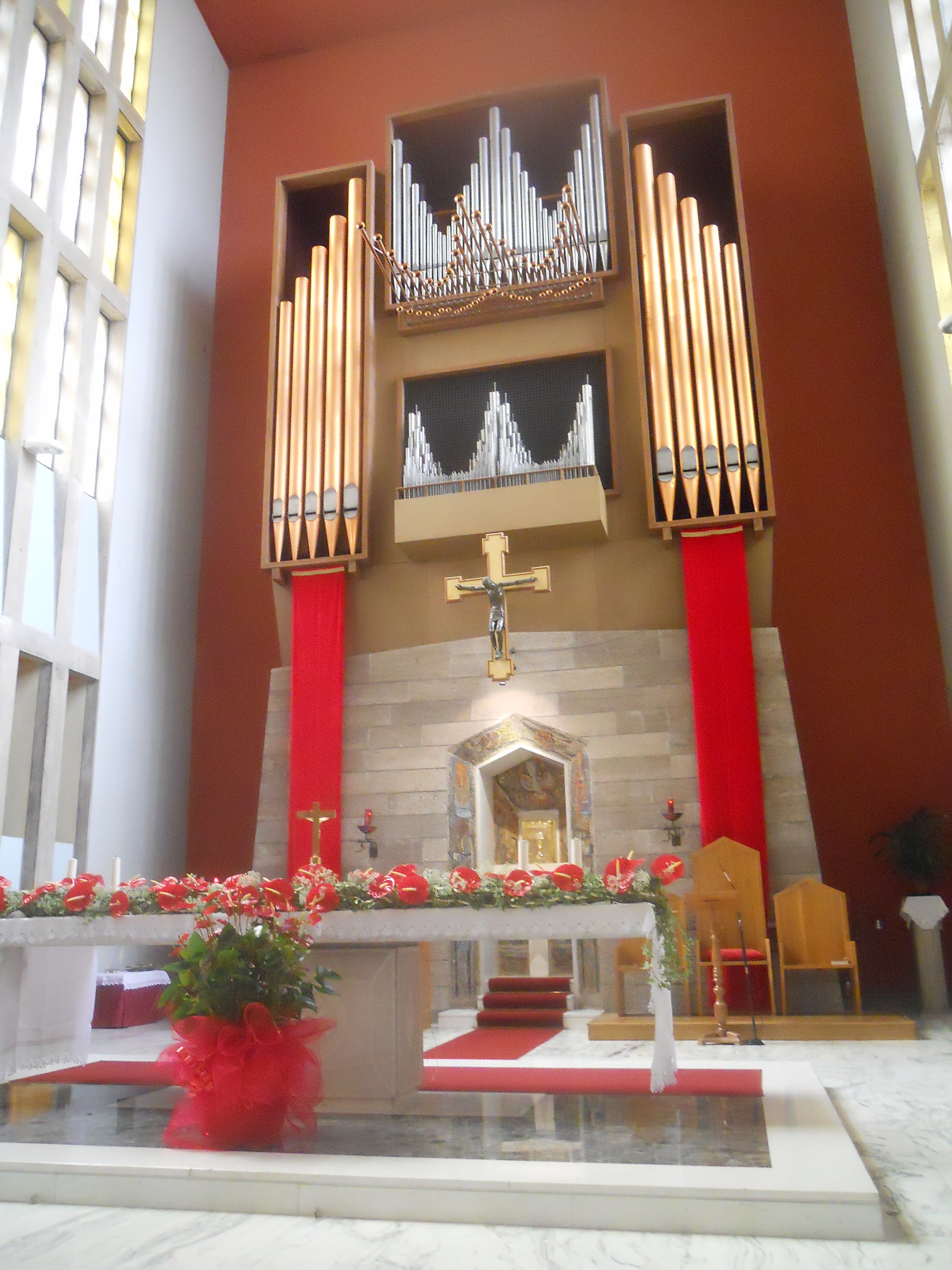 L'altar maggiore della chiesa di San Pio X alla Balduina